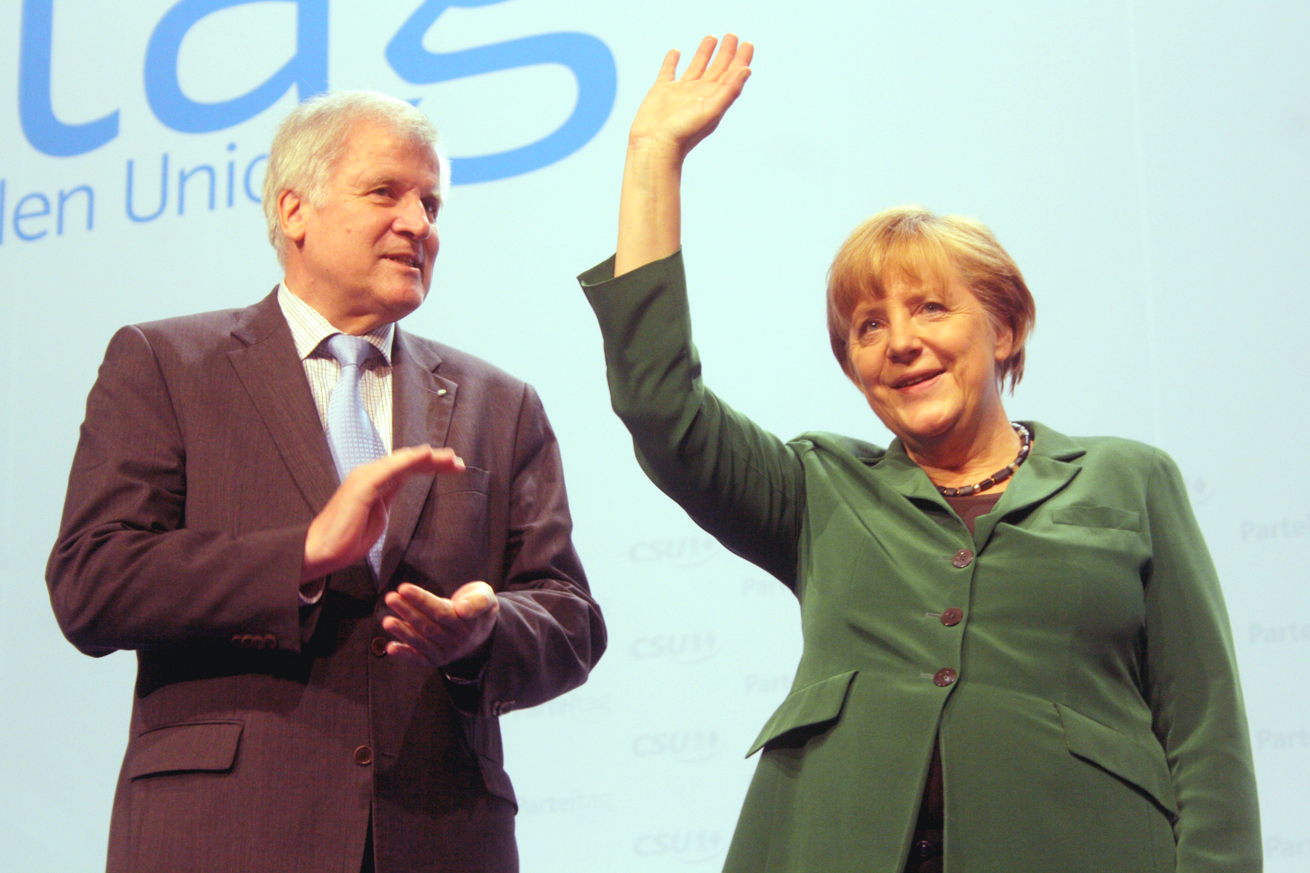 Horst Seehofer und Angela Merkel auf dem CSU-Parteitag 2012 am 19.10.2012 in München.